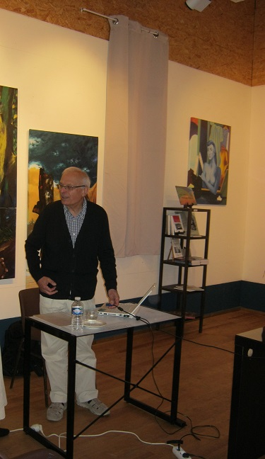 René Souriac lors de la conférence au Musée de peinture de Saint-Frajou